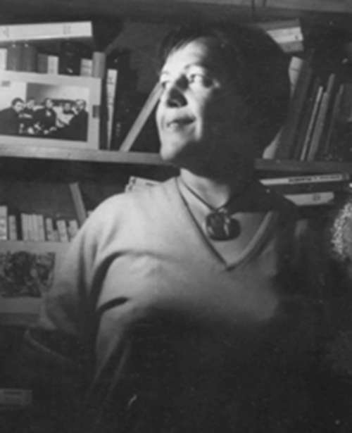 Portrait de l'écrivain à 40 ans